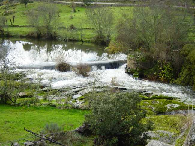 El río Yeltes a su paso por el municipio de Villavieja de Yeltes (Salamanca), a apenas un par de kilómetros antes de que reciba las aguas del Huebra.